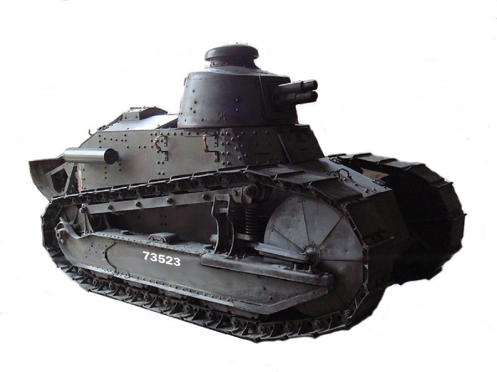 Char Renault FT-17